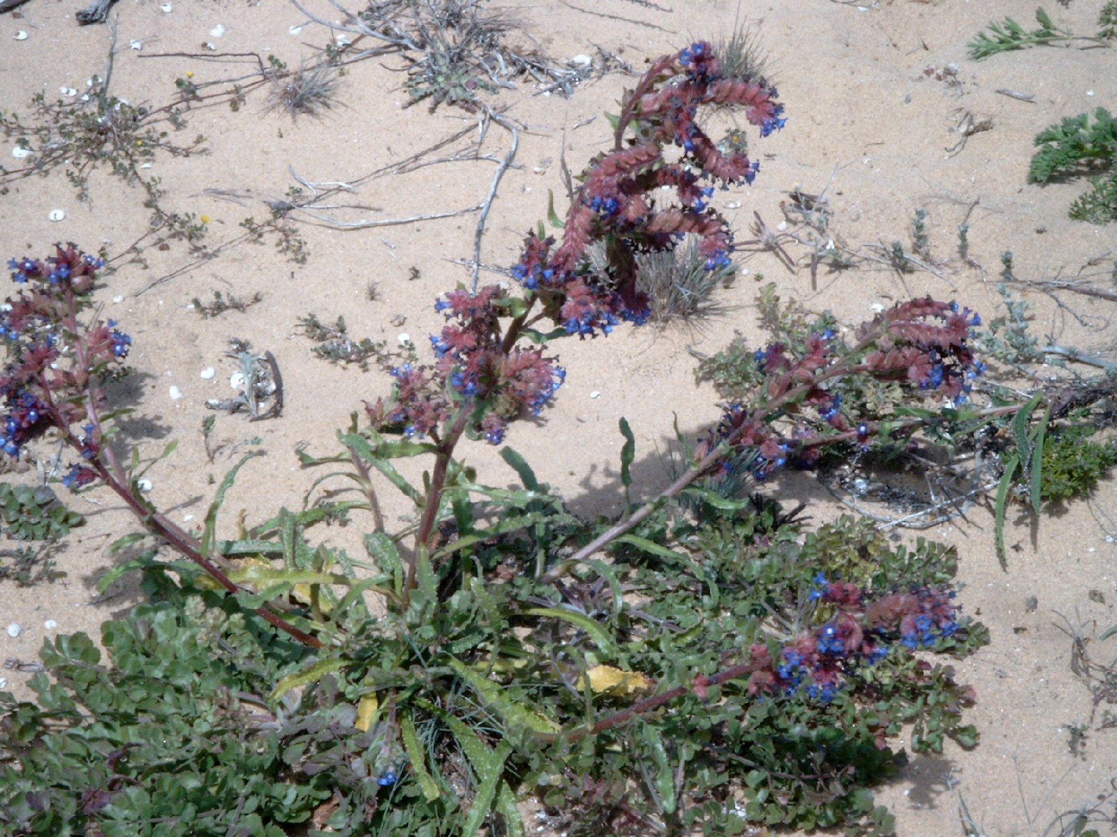 Name Anchusa calcarea Familiy Boraginaceae